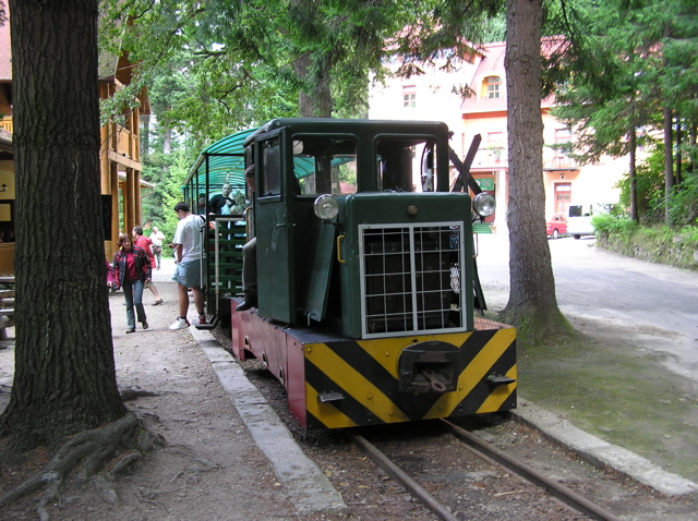 C–50-es dízelmozdony a Pálházi Állami Erdei Vasút Kőkapu állomásán.